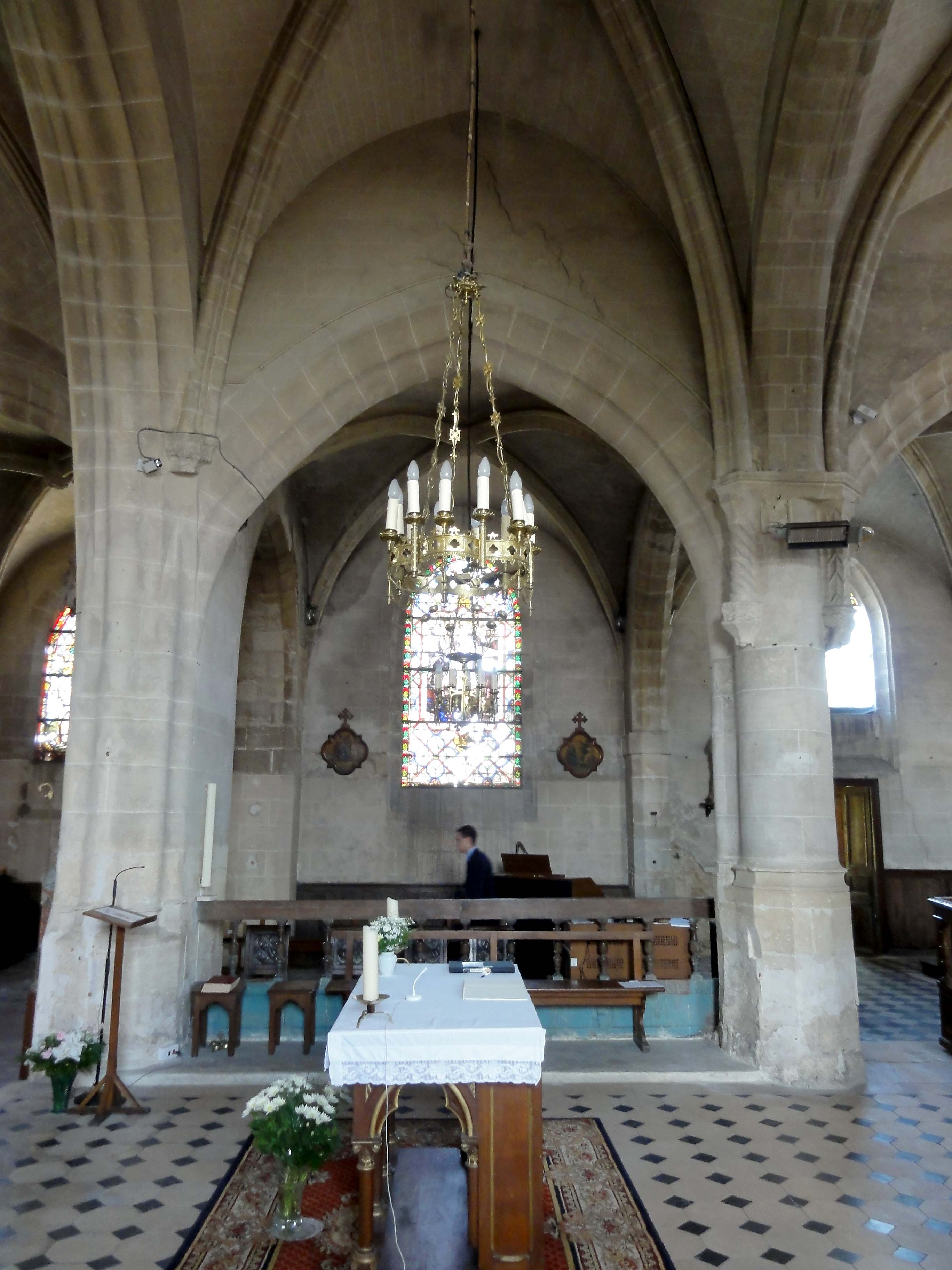 Intérieur de l'église (voir titre).